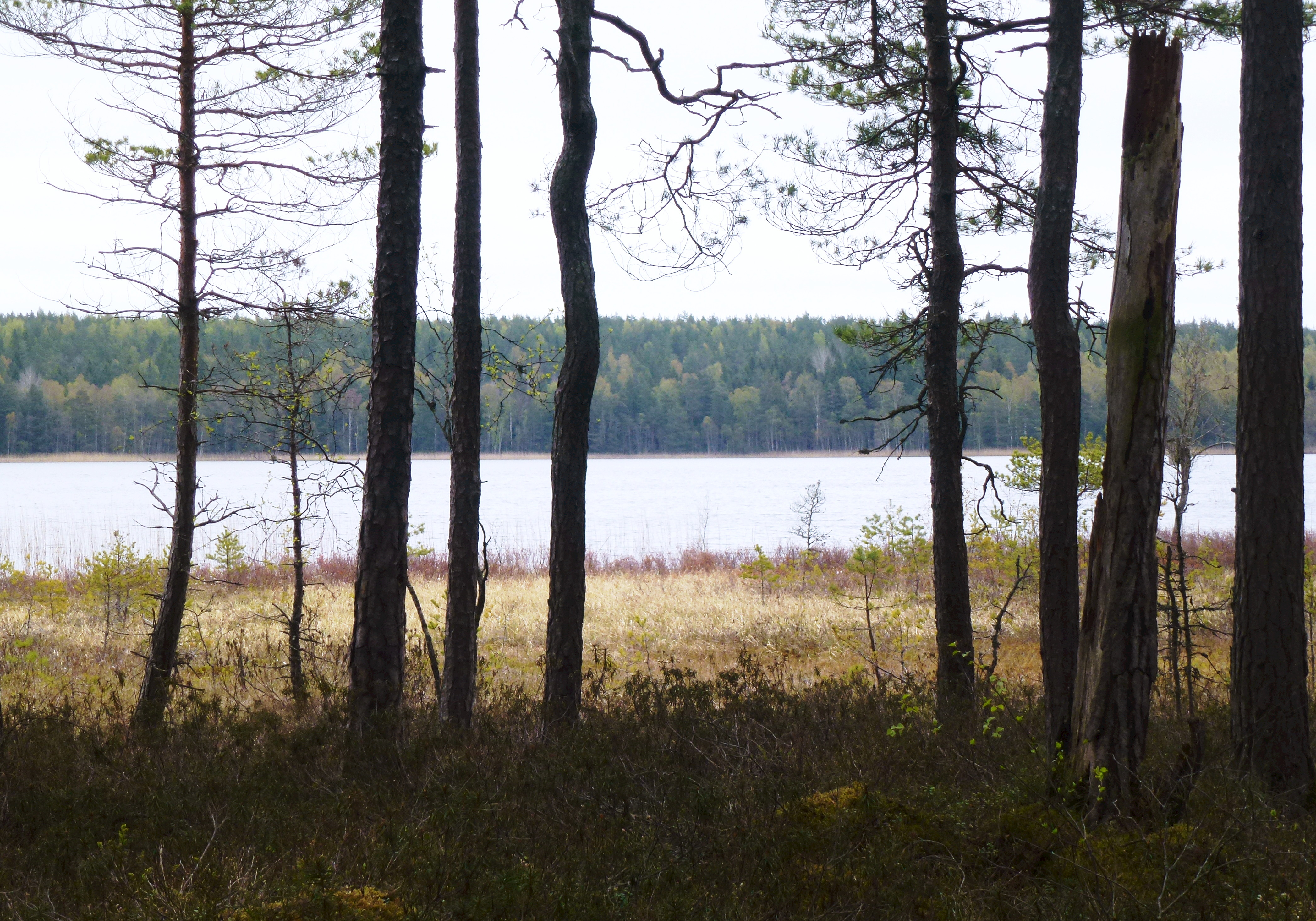 Tallbevuxen strandmosse i Svartkällsskogens naturreservat